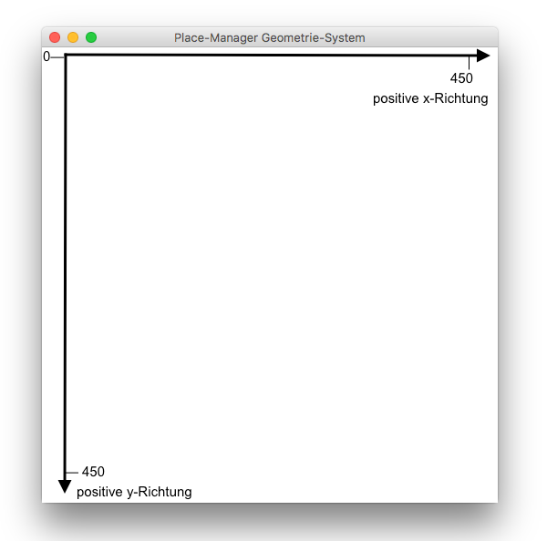 System des Tkinter Place-Managers mithilfe der Geometrie-Kennzeichnung